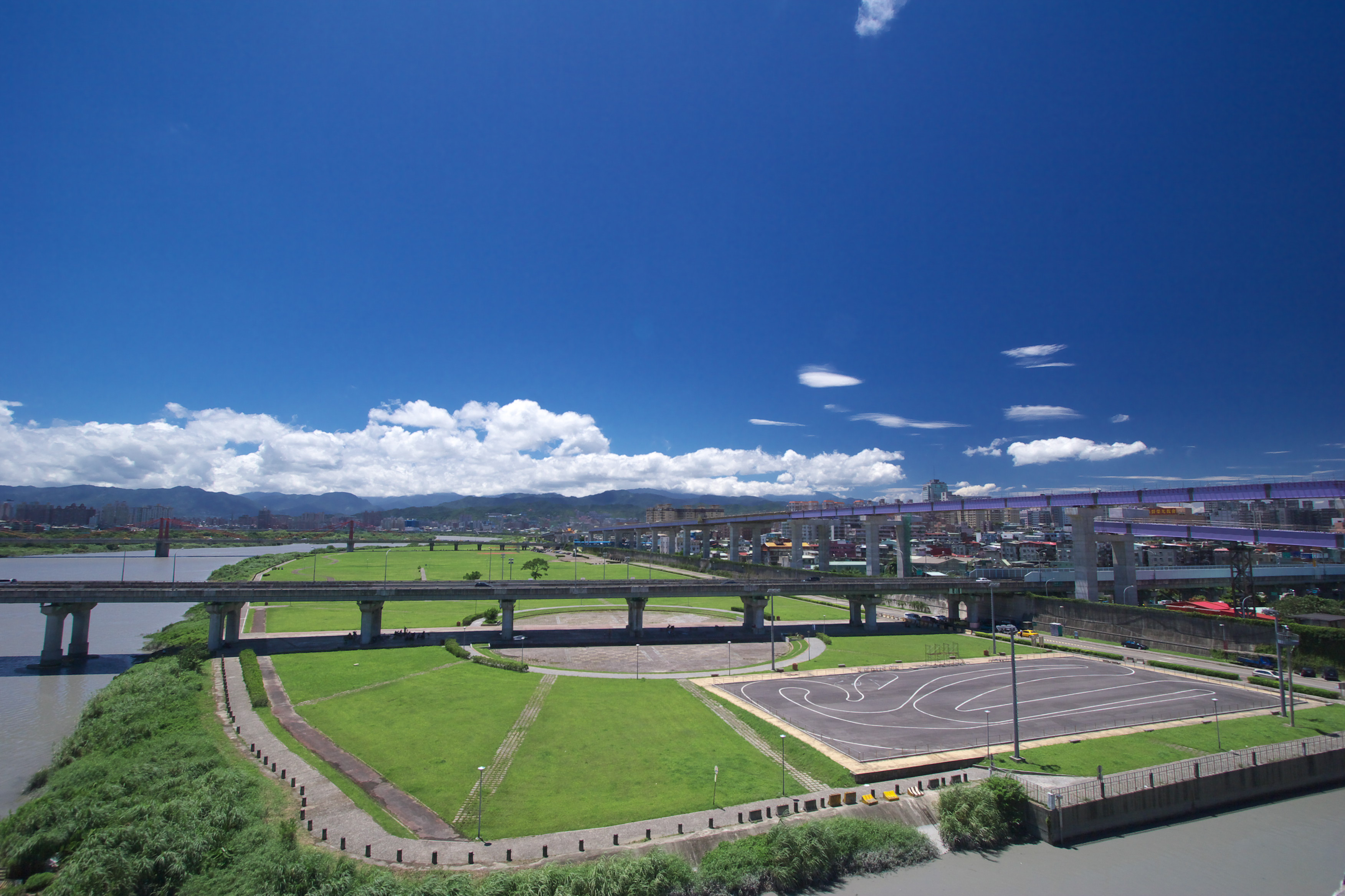 從萬板大橋望向華翠大橋所見到的天空景象